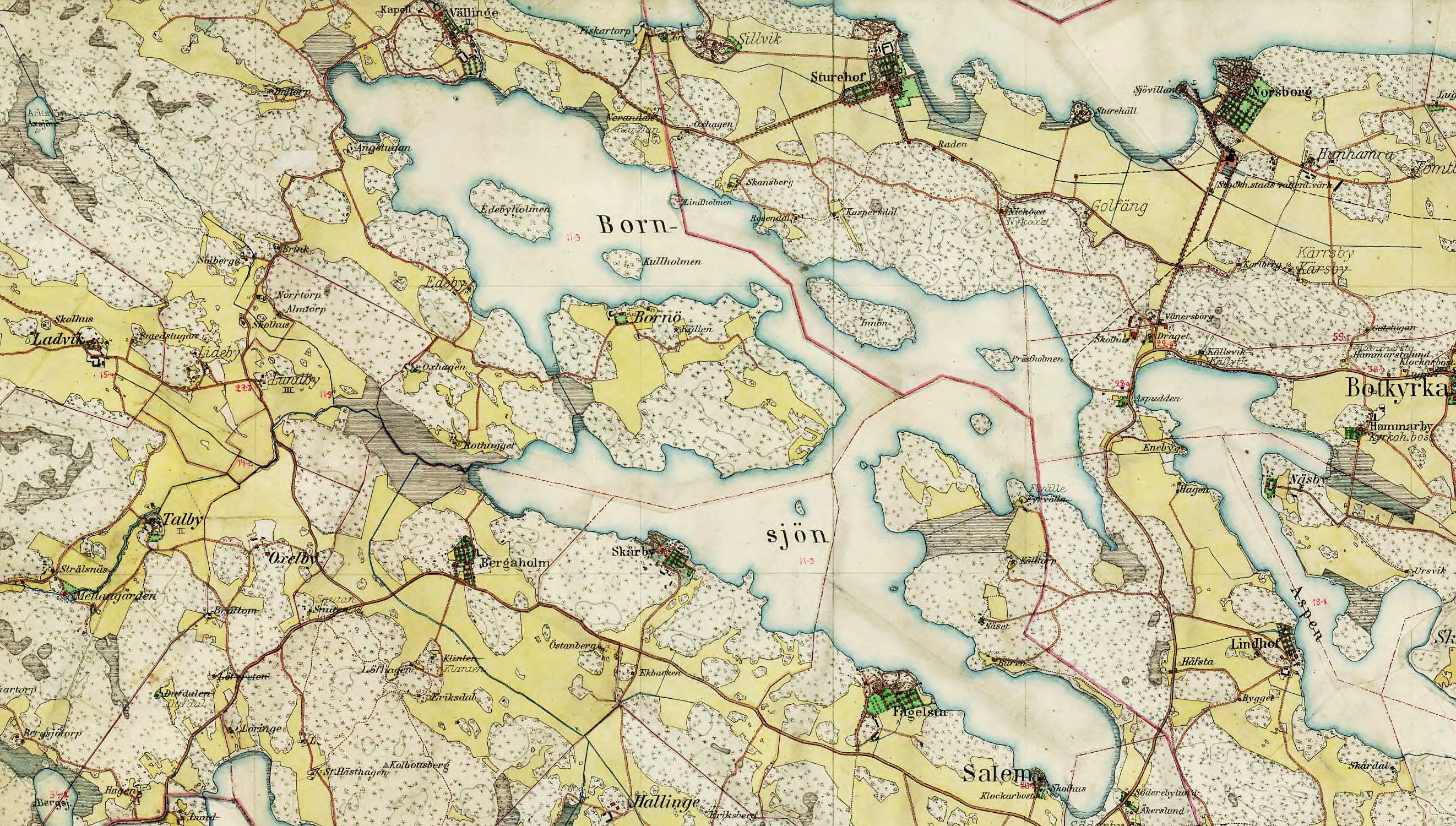 Bornsjön med egendomarna (motsols) Sturehov, Vällinge, Edeby, Bornö, Bergaholm, Skårby och Fågelsta